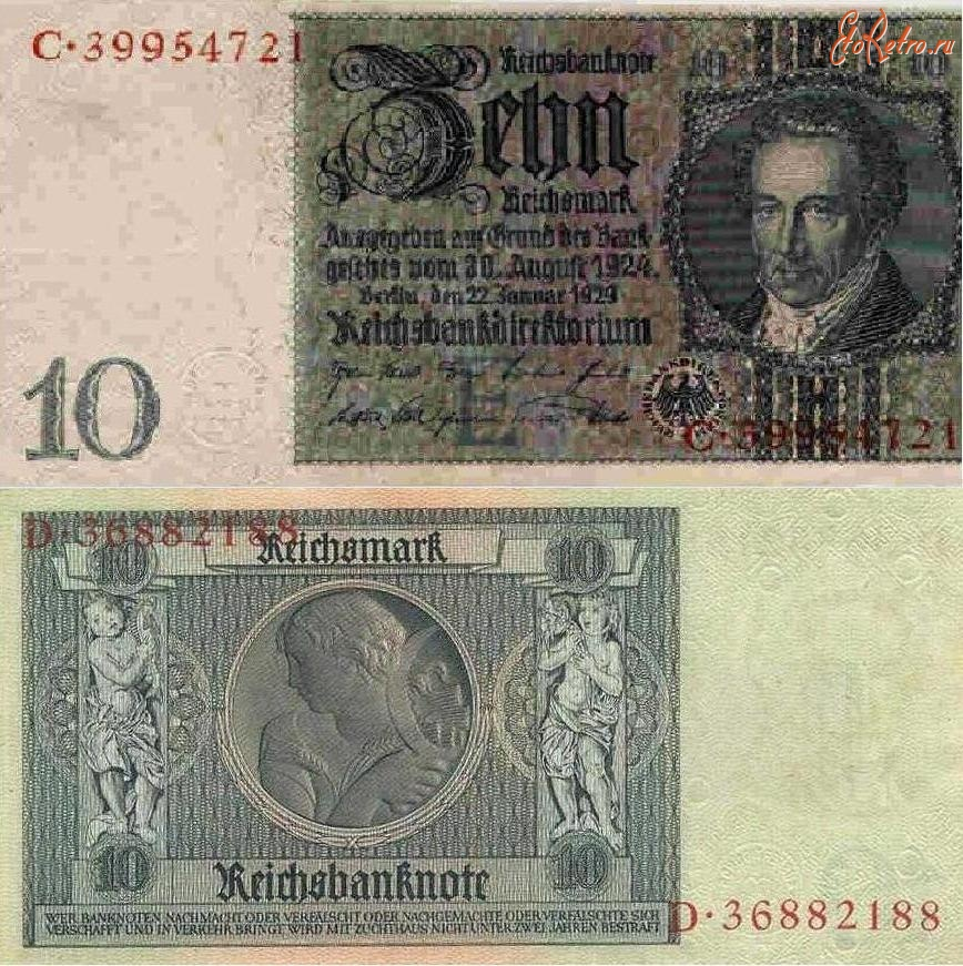 10 рейхсмарок 1929 год Германия.